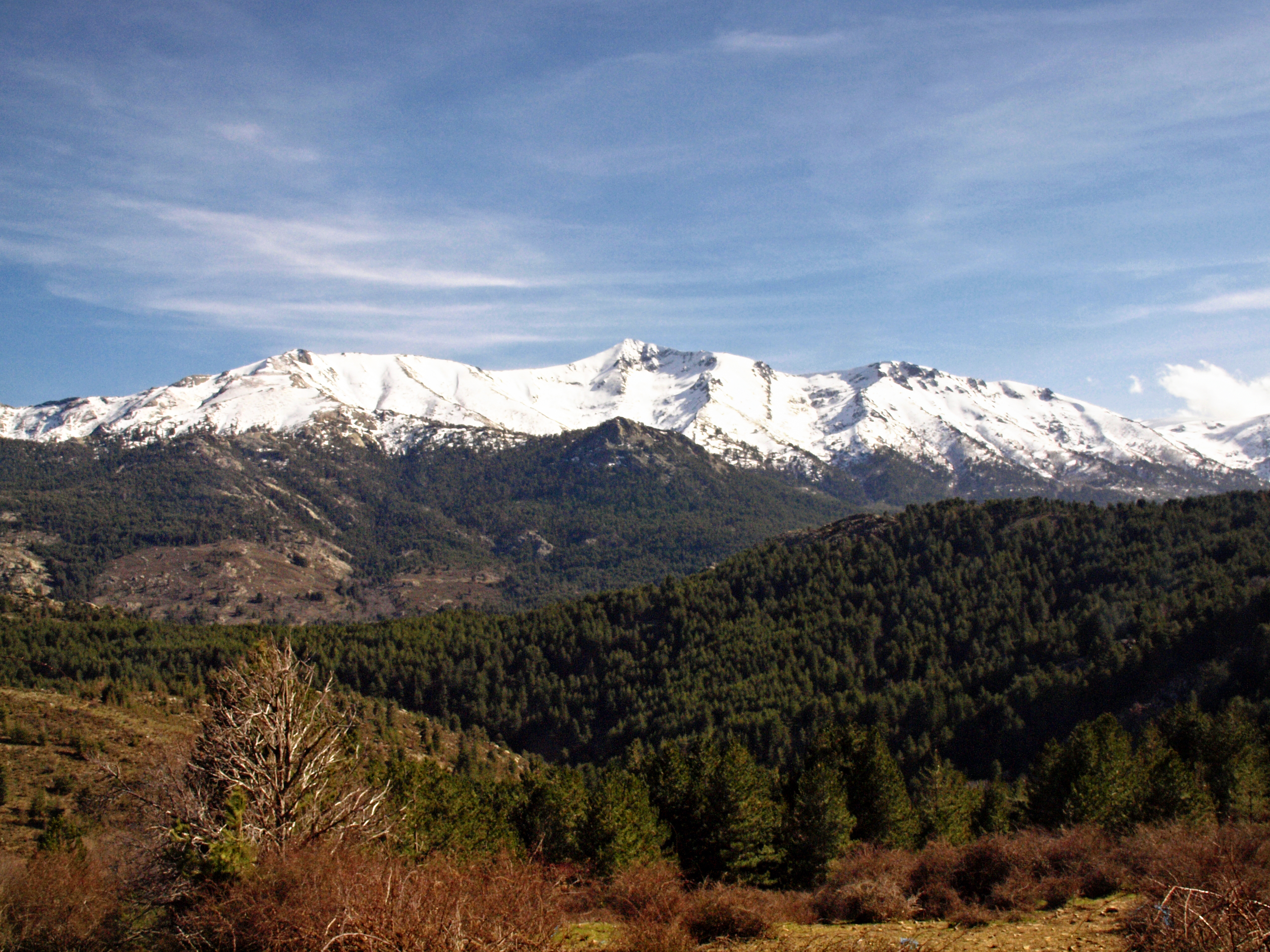 Albertacce (Corsica) - Forêt de Valdu Niellu